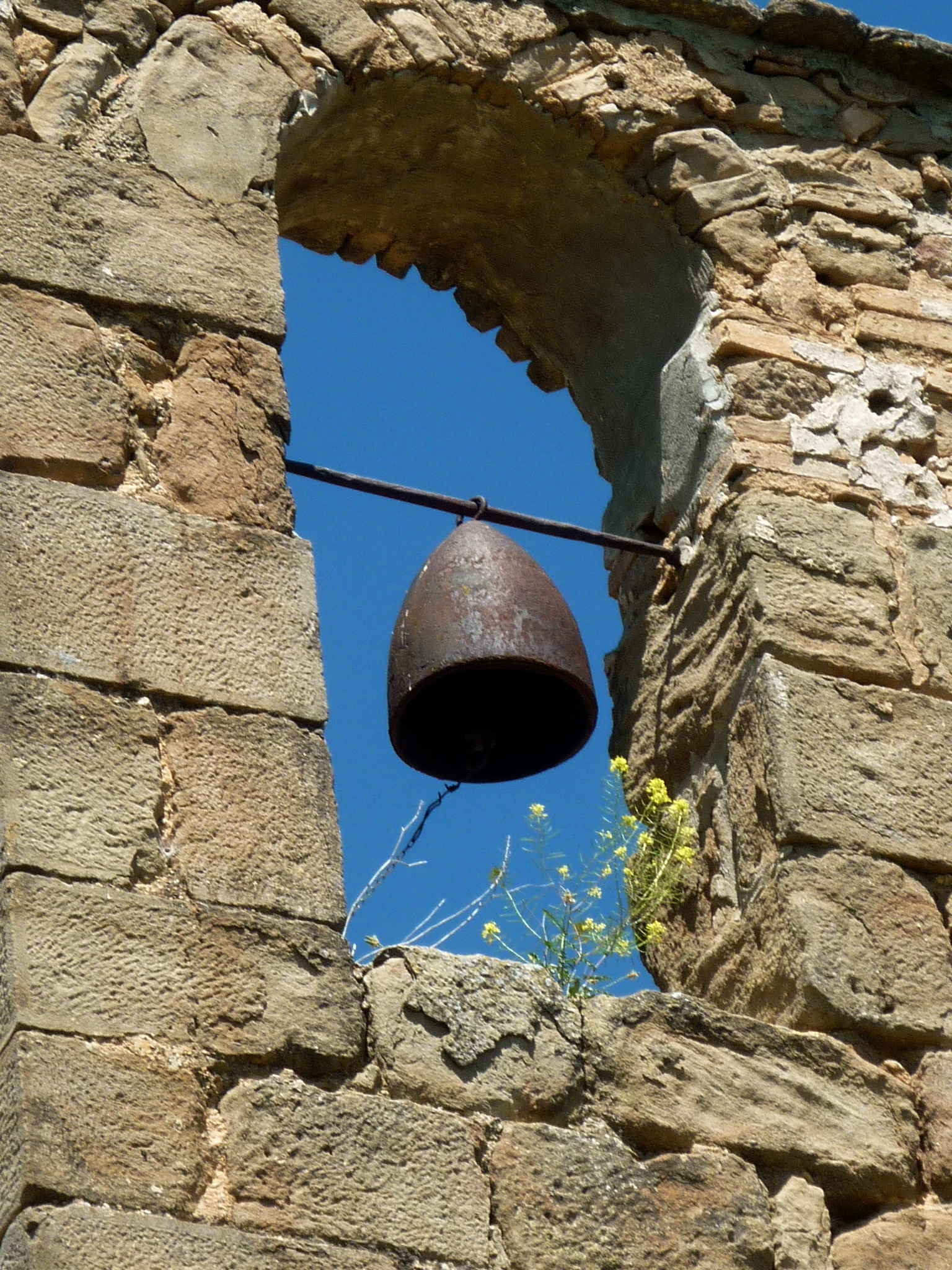 Església de Sant Gil de Folquer (Artesa de Segre): l'ogiva d'un obús fa les funcions de campana